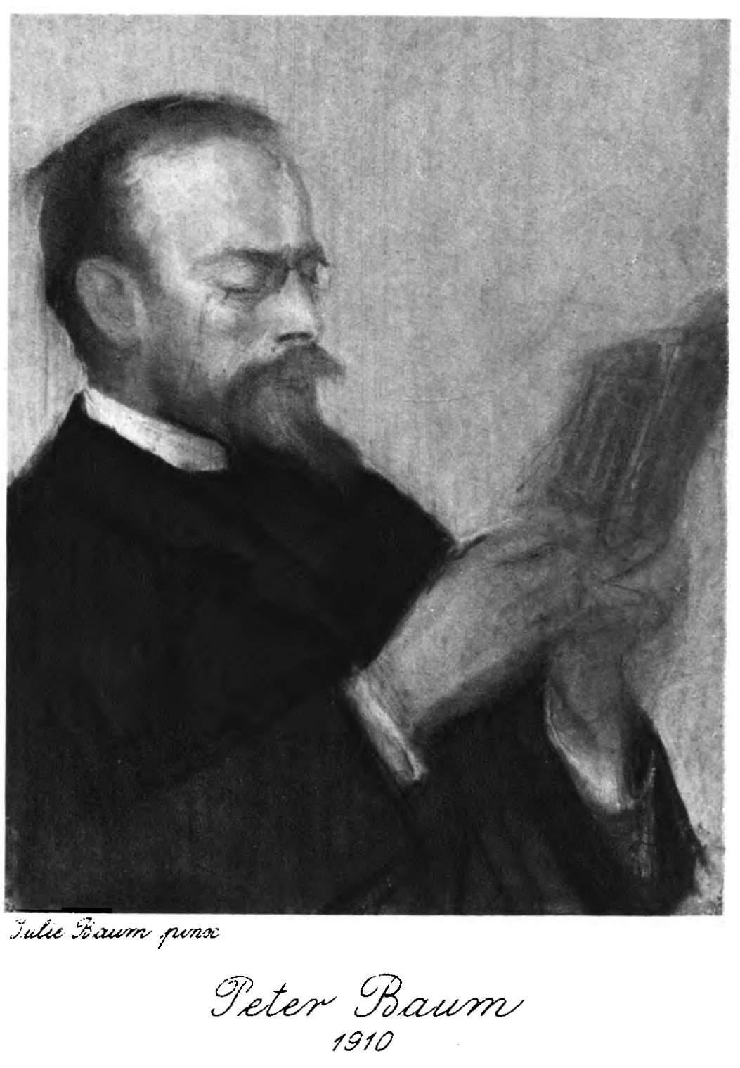 Portrait Peter Baum. In: Gesammelte Werke, Band 1. Hrsg. von Hans Schlieper. Berlin: Rowohlt, 1920